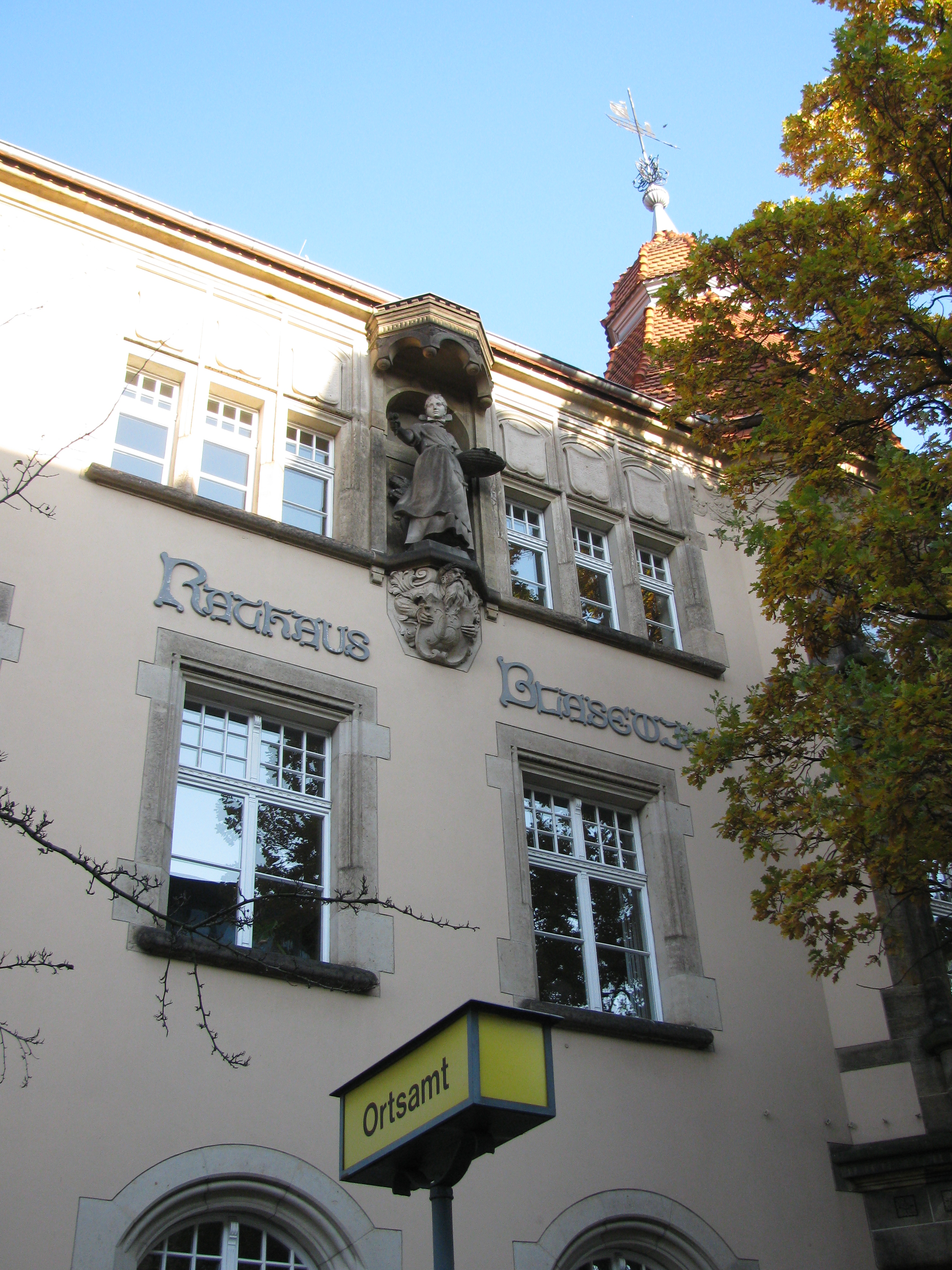 Rathaus Blasewitz, Naumannstraße, Dresden